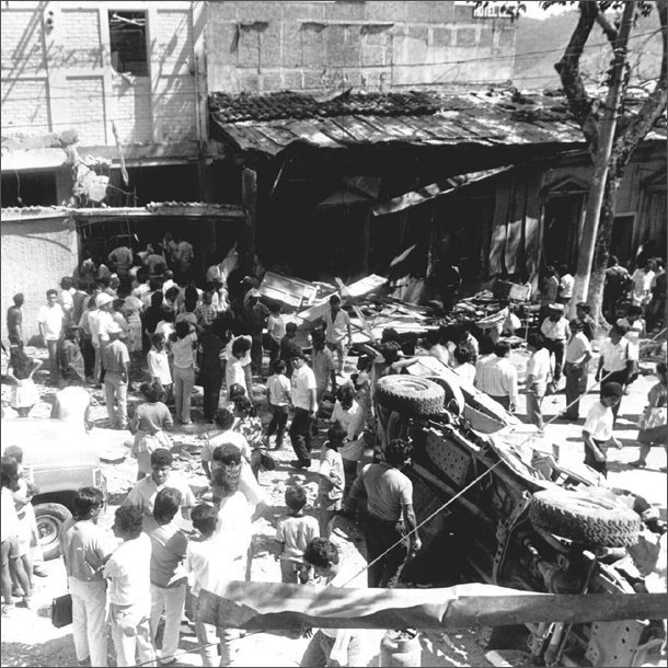 un atentado explosivo destruye el local de la Federación Nacional Sindical de Trabajadores Salvadoreños (FENASTRAS) y mata a su líder Febe Elizabeth Velásquez, a 9 personas más y hiere a casi 30. El FMLN-FDR anuncia su retiro de la negociación de paz con el gobierno salvadoreño.